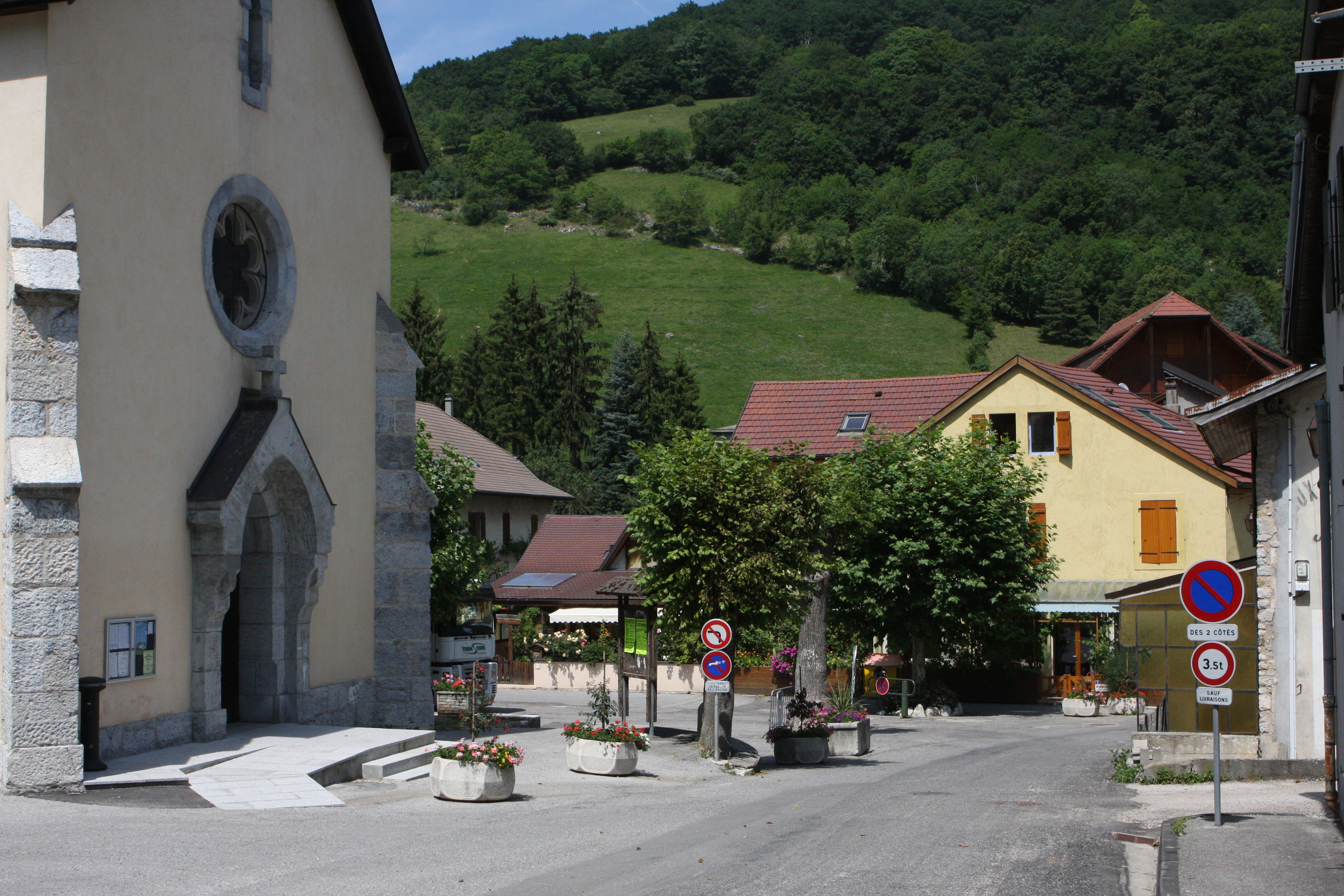 Eingang der Kirche in Monnetier-Mornex